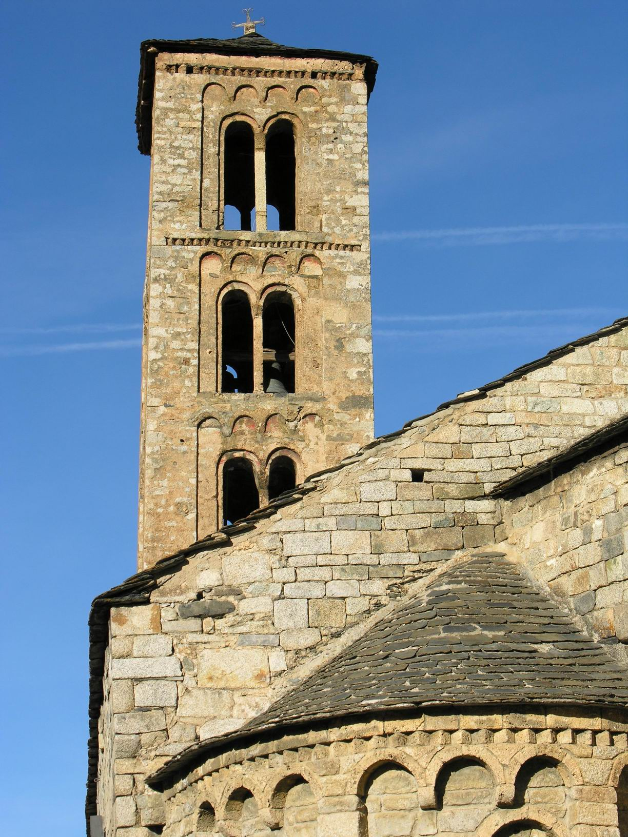 Santa Maria de Taüll